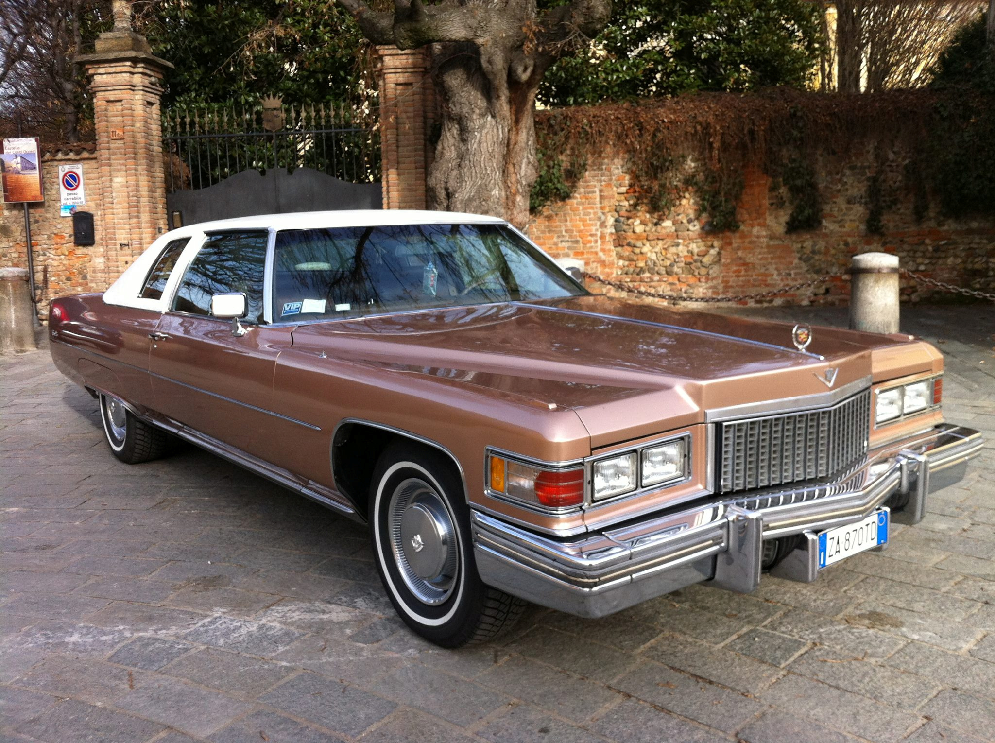 Raffaele Corneo s ACRS equipped coupe.